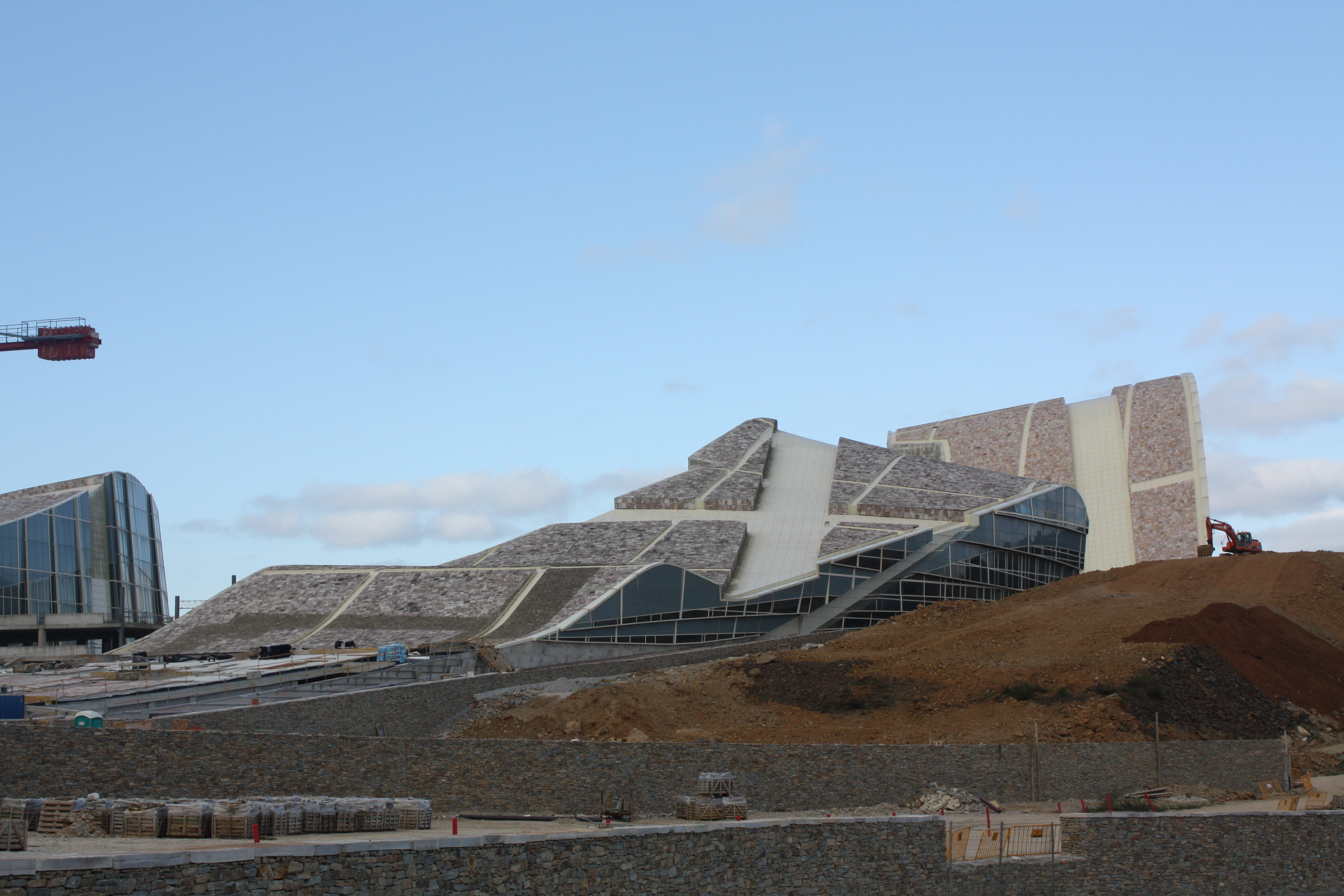 Vista xeral da Cidade da Cultura. En primeiro plano, o Edificio de Servizos Centrais; ó fondo á dereita, o Museo de Galicia.